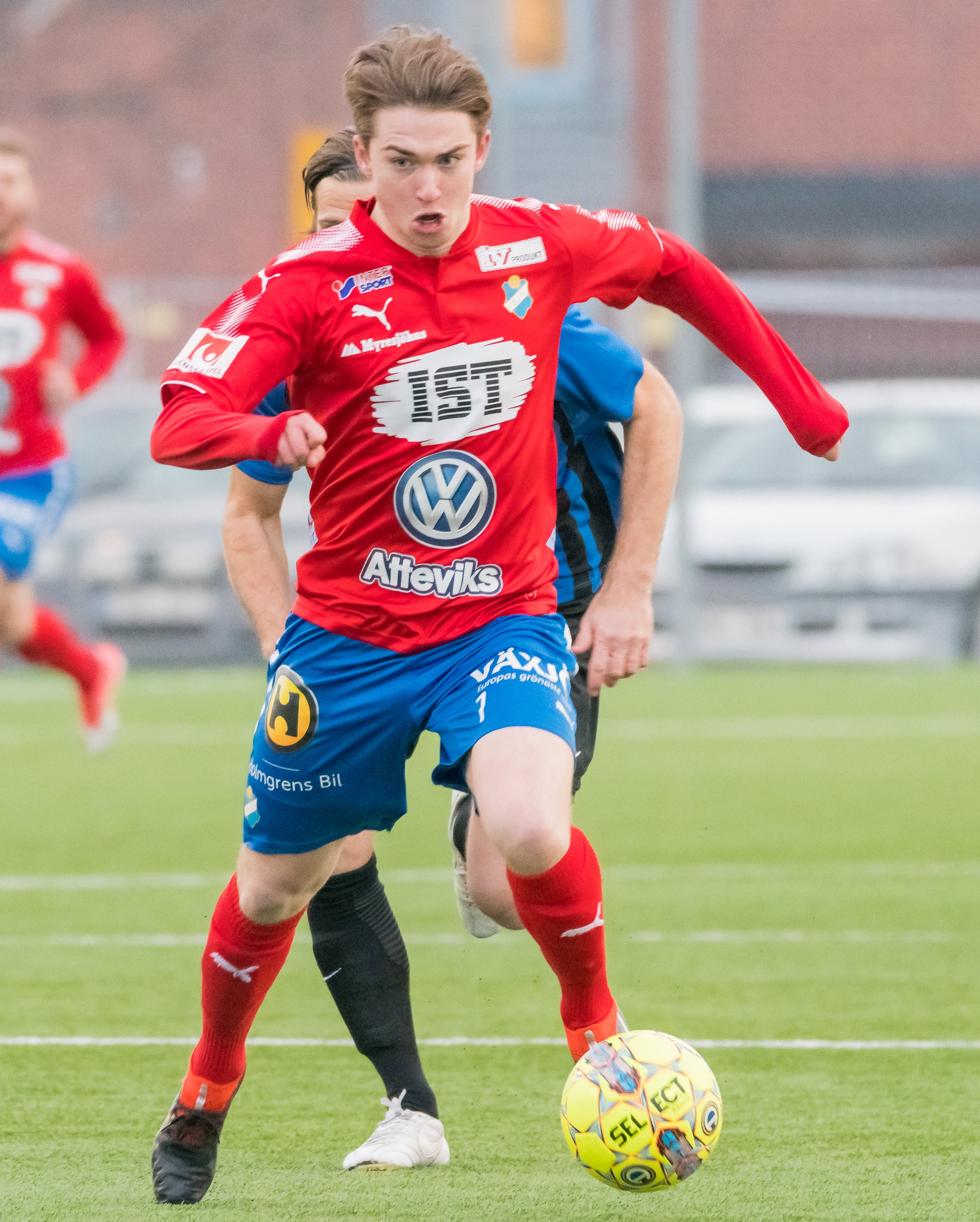 Den svenske mittfältaren Carl Johansson spelar för Öster mot Sirius i Svenska Cupen 2018 på Lötens IP i Uppsala.